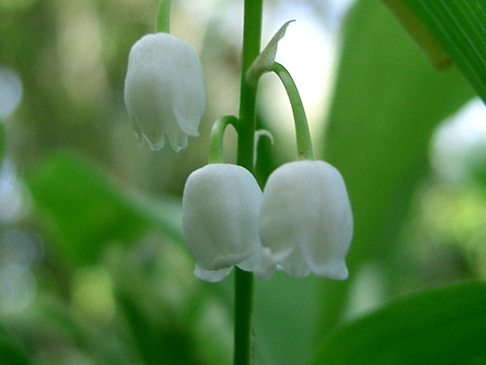 muguet gros plan photo personnelle PRA